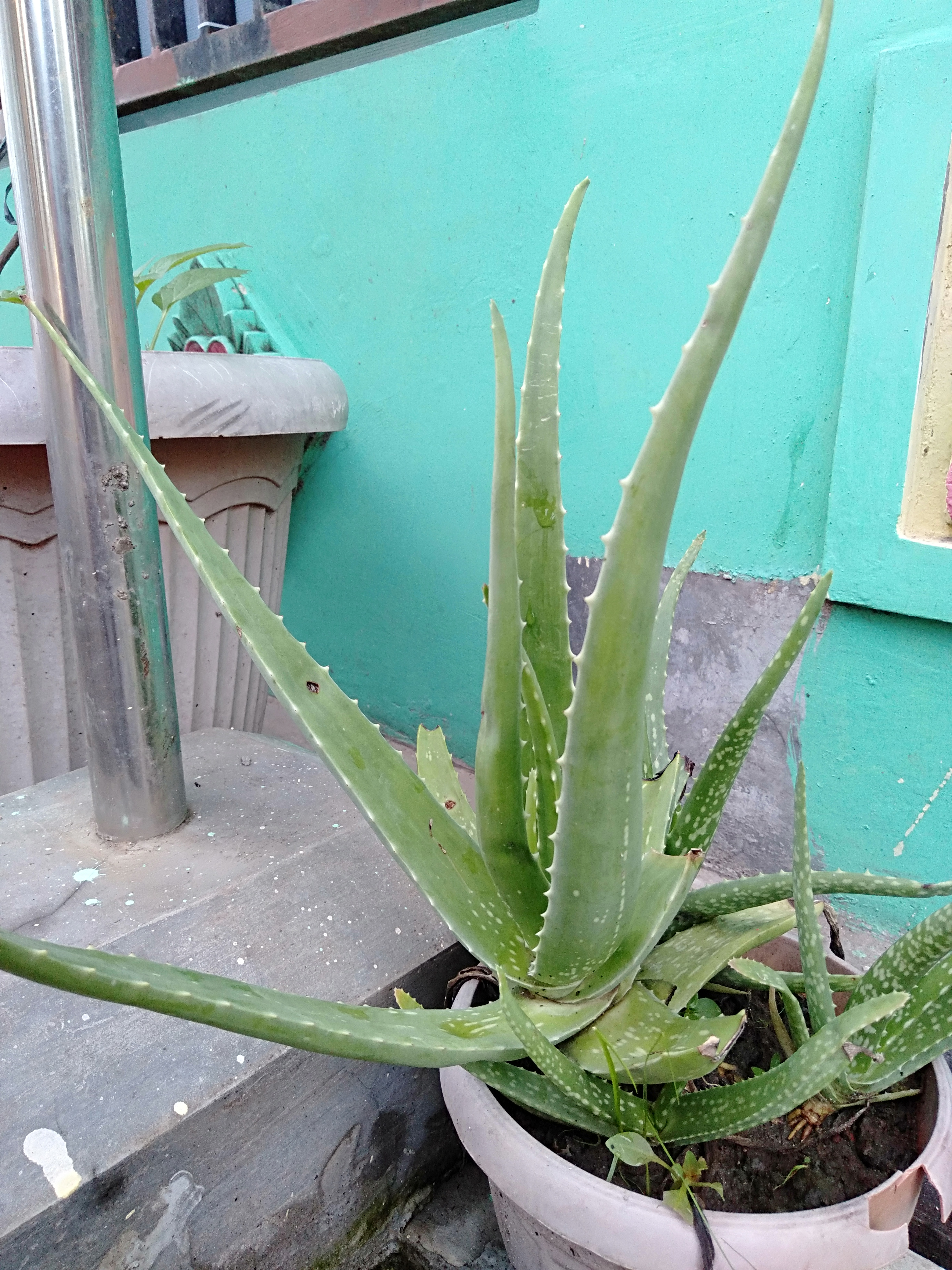 Basa Jawa: lidah buaya iku tanduran ingkang nduweni mupangat sing akeh, bisa kanggo ngalusake kulit, rambut, bisa kanggo obat uga. arep kabeh omah ning desaku nandur tanduran iki, saiki uga akeh produk kecantikan sik dodol gel lidah buaya ( aloevera )